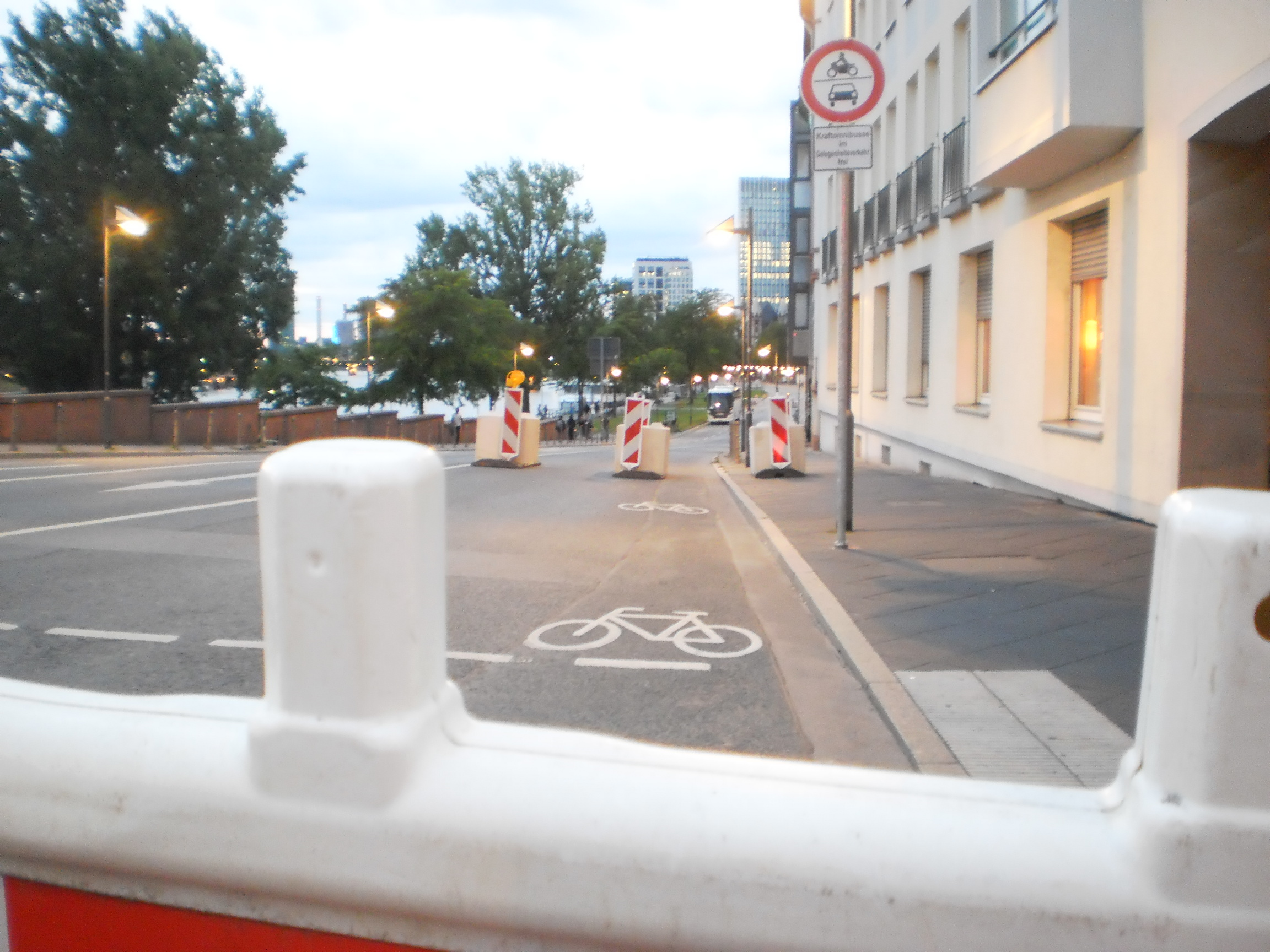 Autofreier Mainkai als Flaniermeile für Radverkehr in Frankfurt und zu Fuss gehende Leute freigegebener Abschnitt am nördlichen Mainufer in Frankfurt mit Straßensperre, Beschilderung und zwei Fahrräder als Piktogramme auf der Strasse. Auf der hier im Bild linken Fahrbahn können allerdings Autos aus einem Parkhaus ausfahren, hier an der Kreuzung an der Alten Brücke jedoch auf dieser Uferpfomenade der Metropole nicht einfahren. Die Brückenrampe ist also zu diesem Zeitpunkt nicht wirklich autofrei für Seifenkistenrennen etc. (auch nicht an Wochenenden?). Foto an einem lauschigen Sommerabend Mitte August 2019 mit etwas trockener Ufervegetation in diesem Jahr.